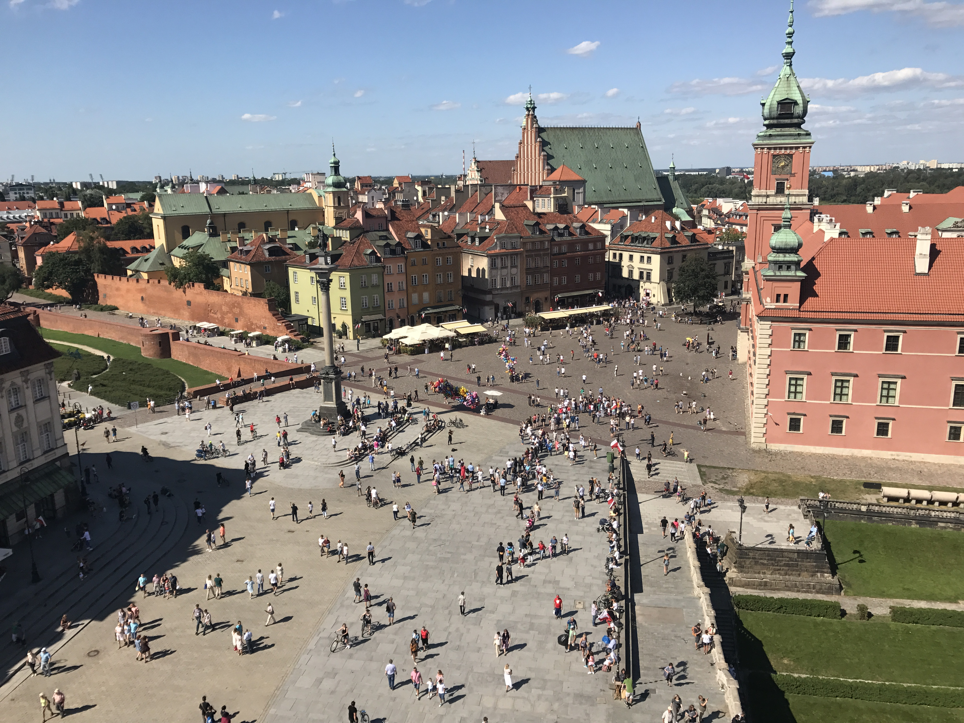 Schlossplatz in Warschau